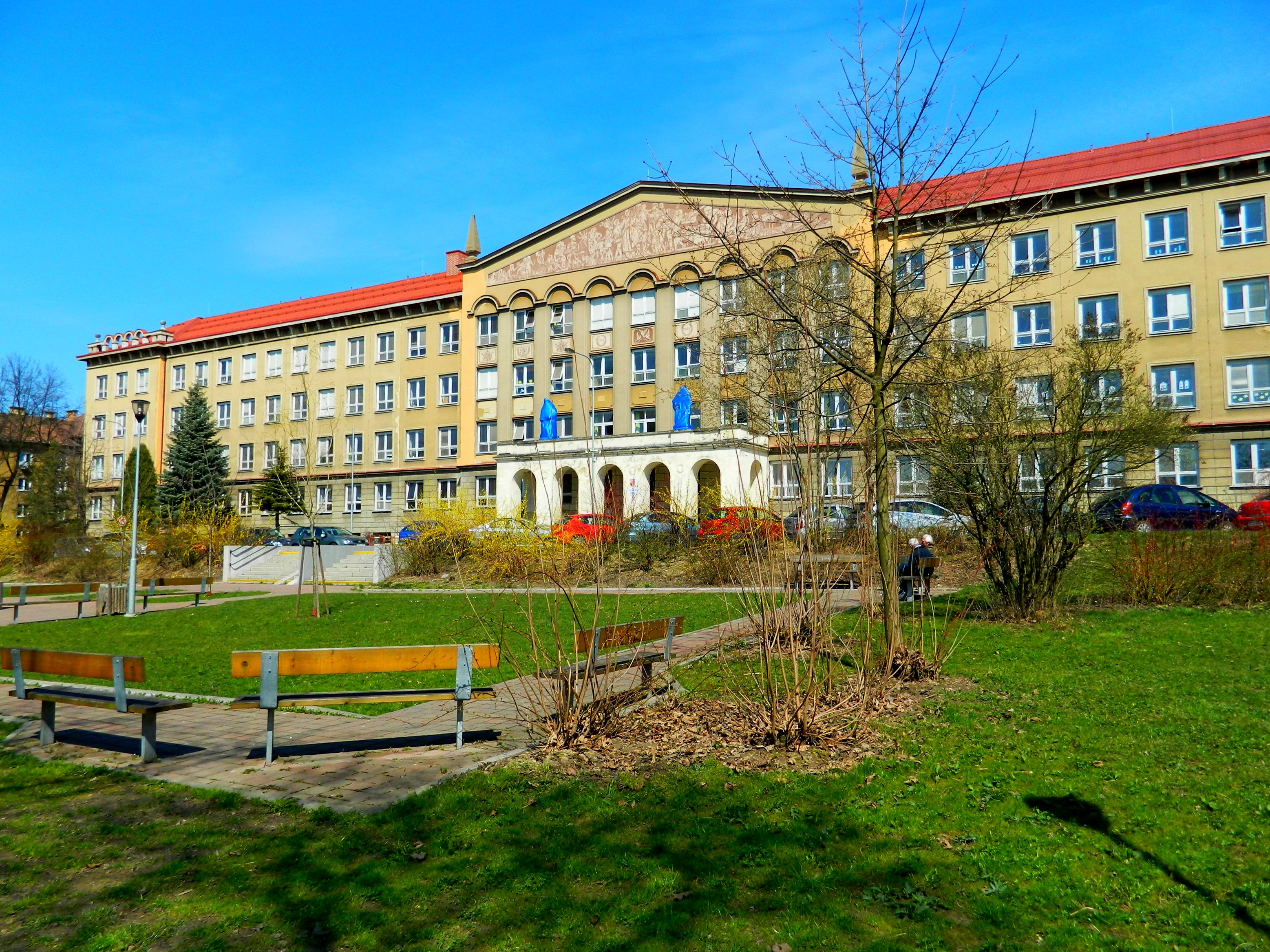 Základní škola postavená ve stylu socialistického realismu (tzv. Sorela)